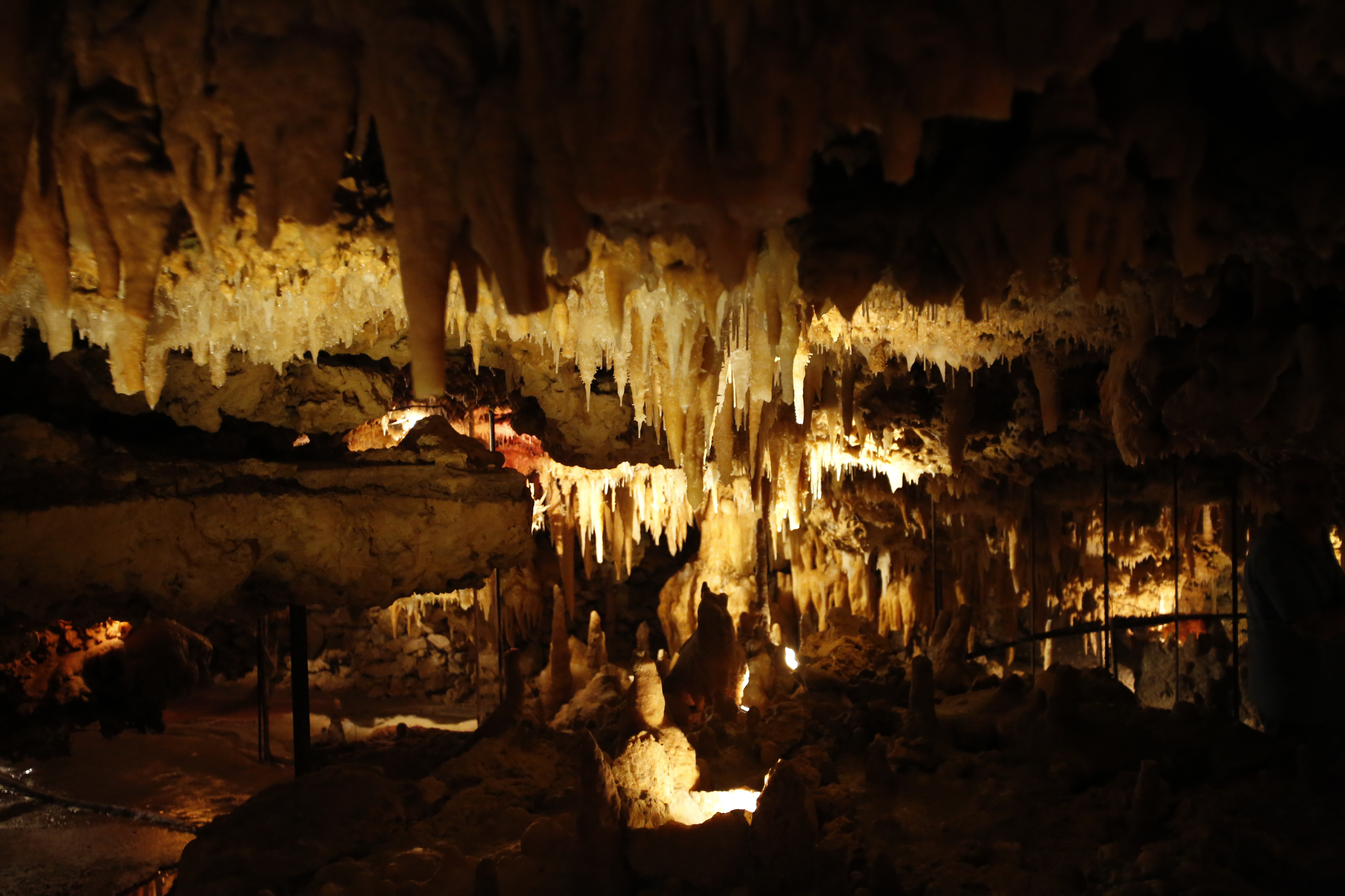 La grotte du Grand Roc aux Eyzies-de-Tayac-Sireuil.